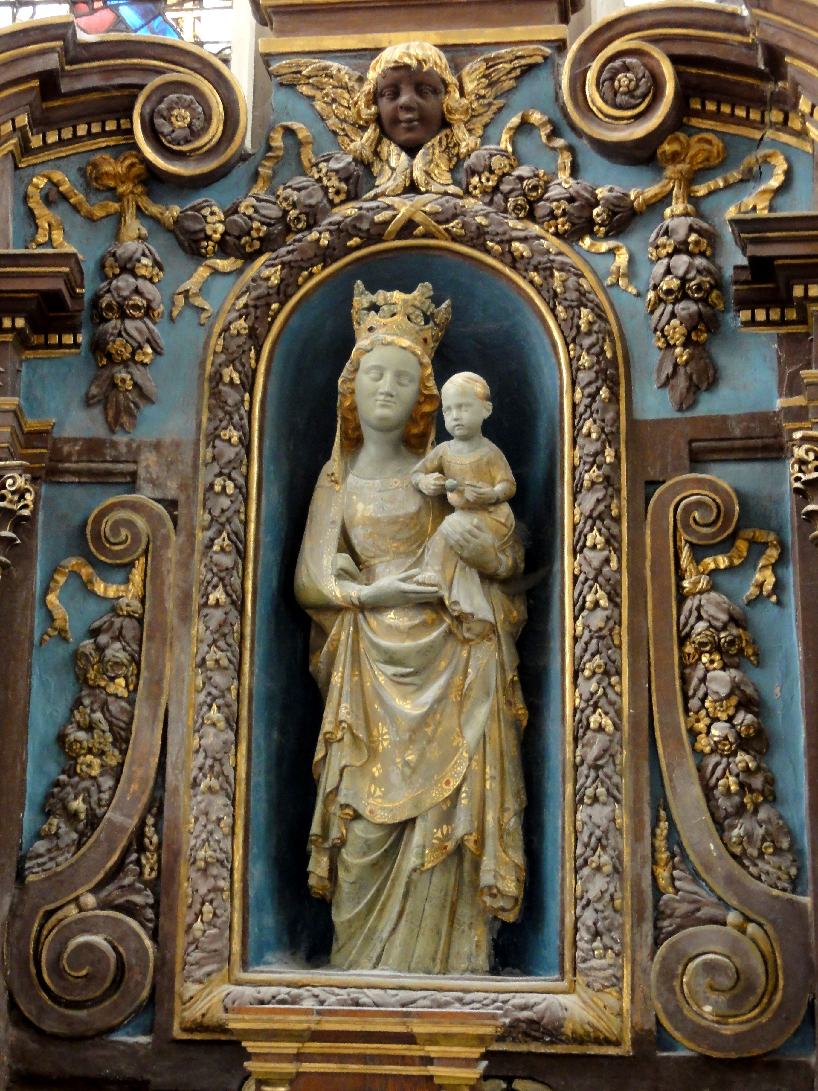 Vierge à l'Enfant du XIVe siècle.